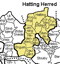 Hatting Herred, Vejle Amt, Denmark Map by Svend-Erik Christiansen , edited by Nico-dk.